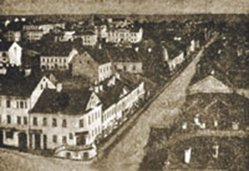 Беларуская (тарашкевіца): Менск (Miensk), рог пляцу Высокага Рынку (plac Vysoki Rynak) і вуліцы Францішканскай (vulica Franciškanskaja). Гатэль Эўропа